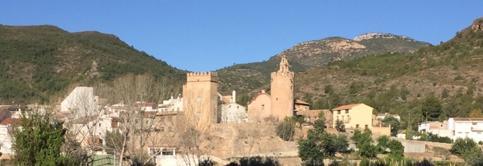 Vista de les dues torres d'Argeleta